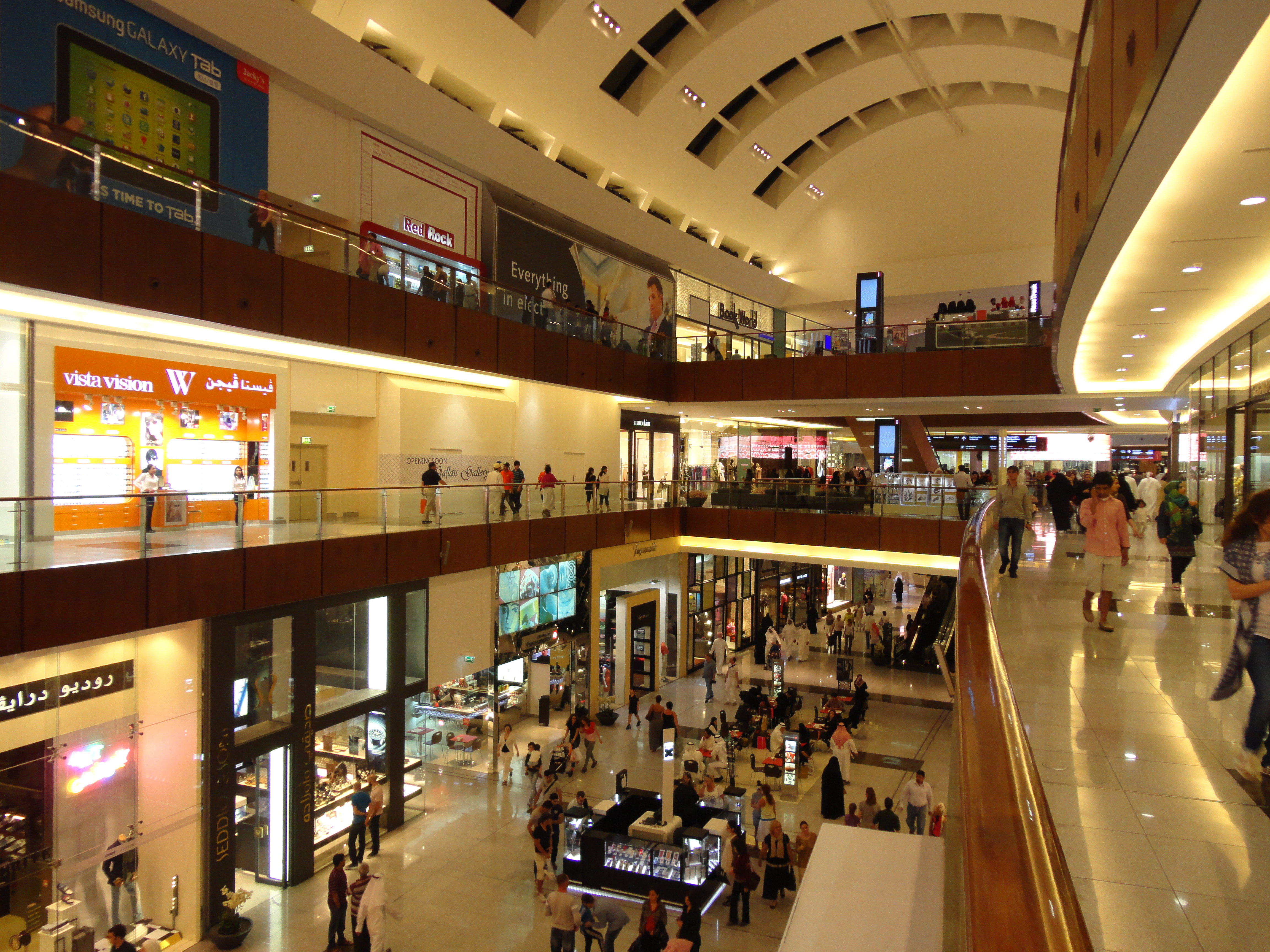 توصویری از یکی از راهروهای دبی مال در دبی، امارات متحده عربی در تاریخ فروردین ۱۳۹۱